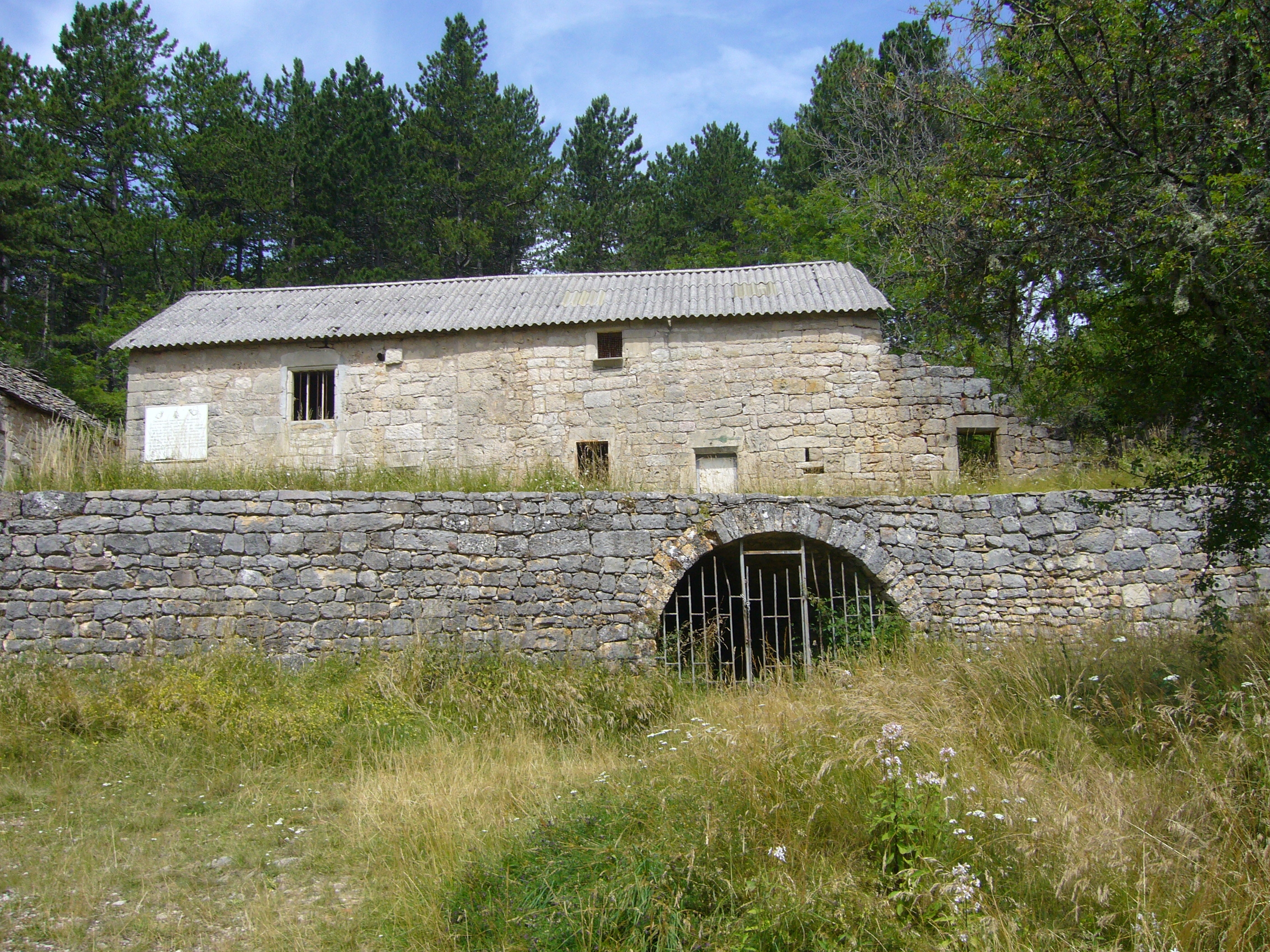 Village mort de la Chaumette, sur le mont Mimat (Mende, Lozère, France)